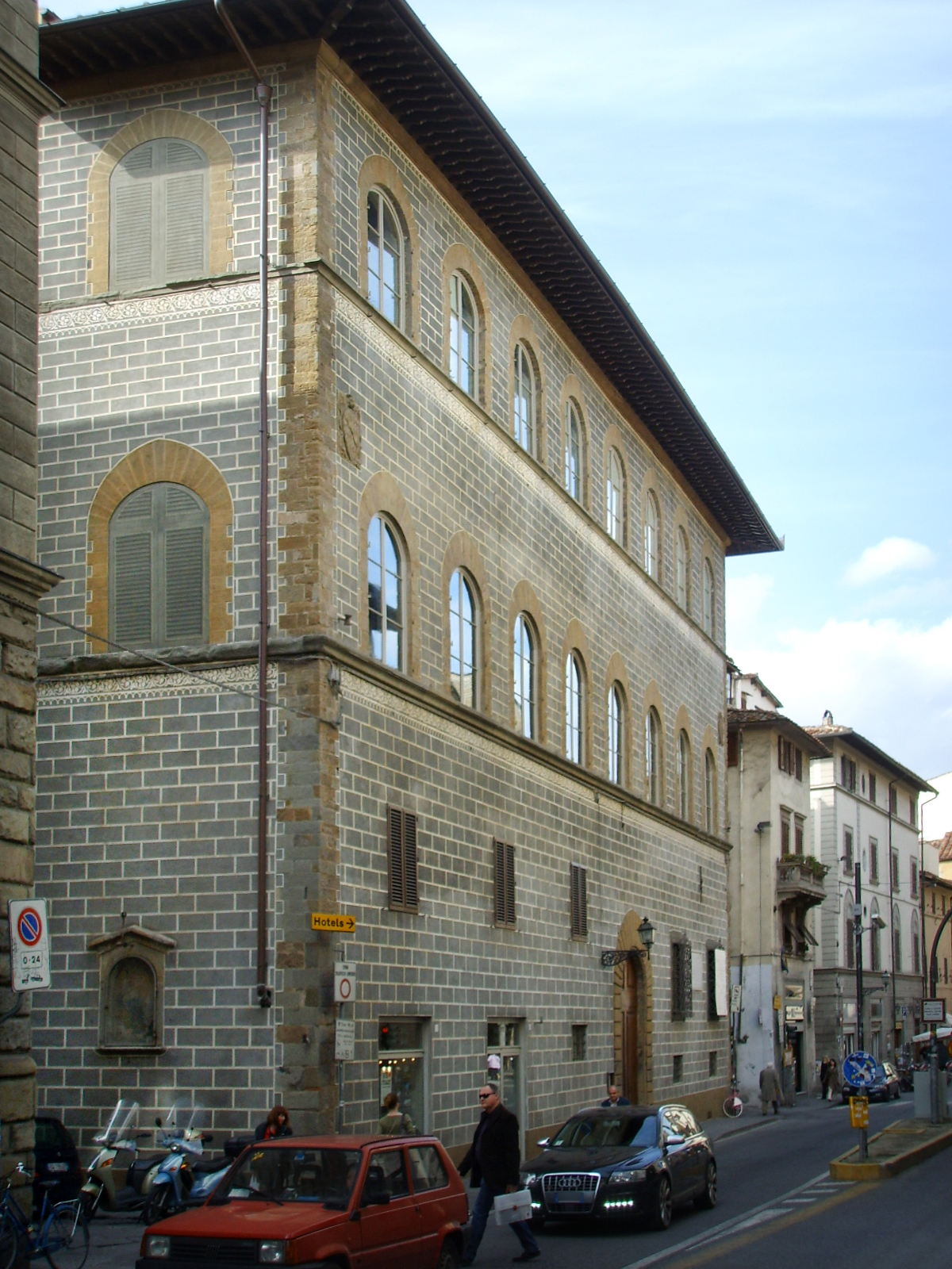 Palazzo busini-bardi